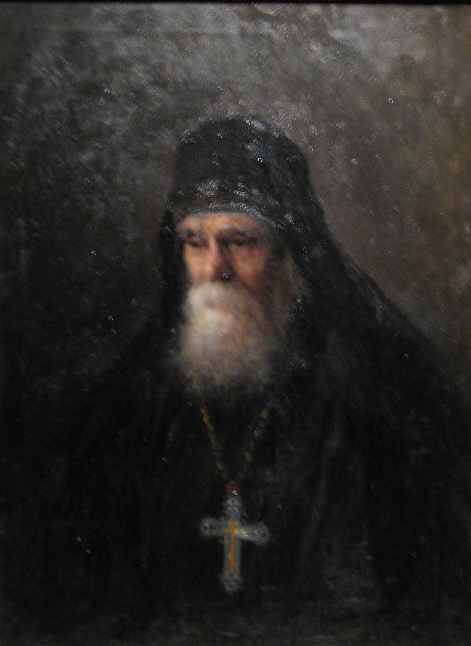 Выставка "Национальная портретная галерея", 2012. Павел (Леднев). Художник Алексей Дмитриевич Корольков (1869 – 1895)